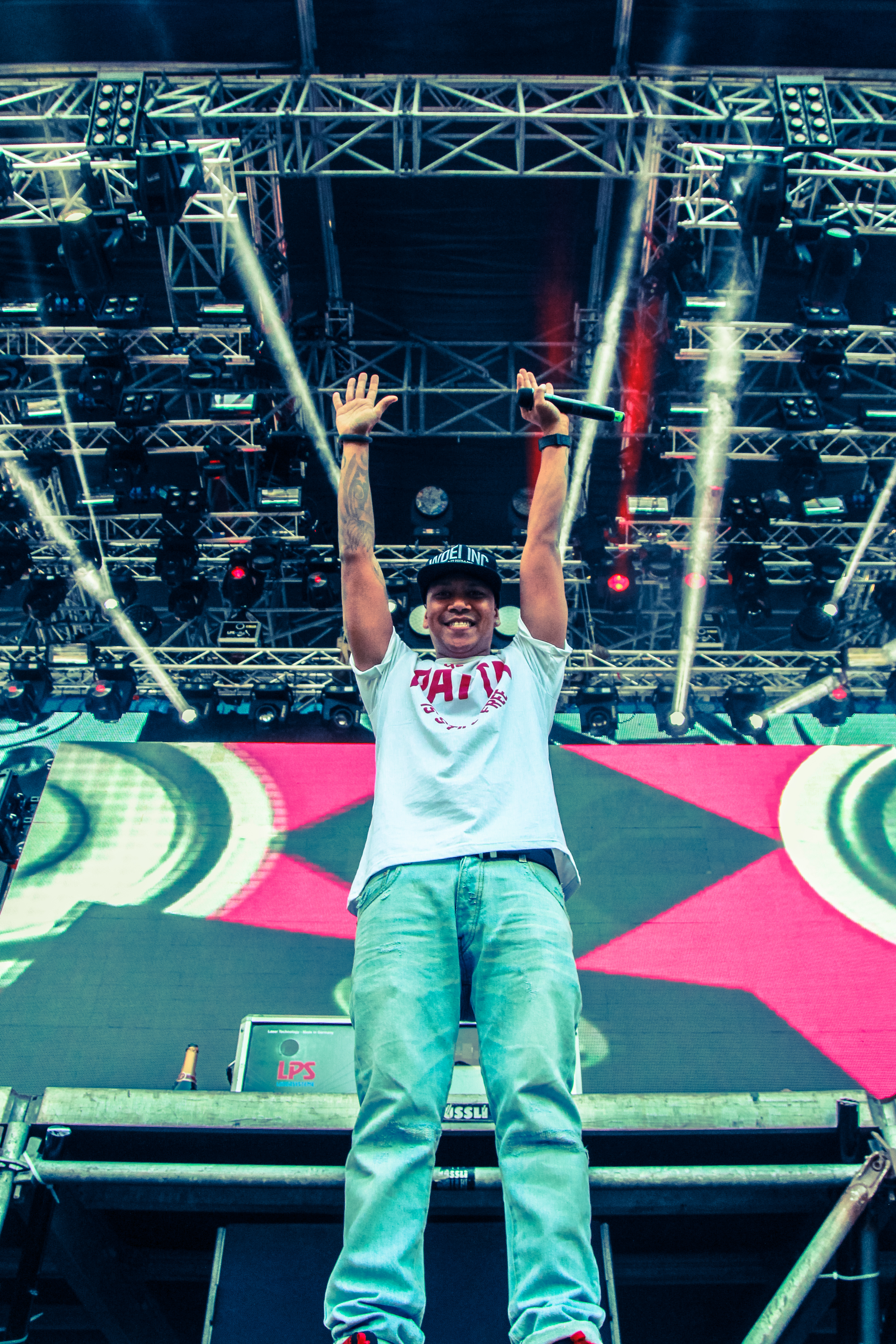 Electric Love Festival